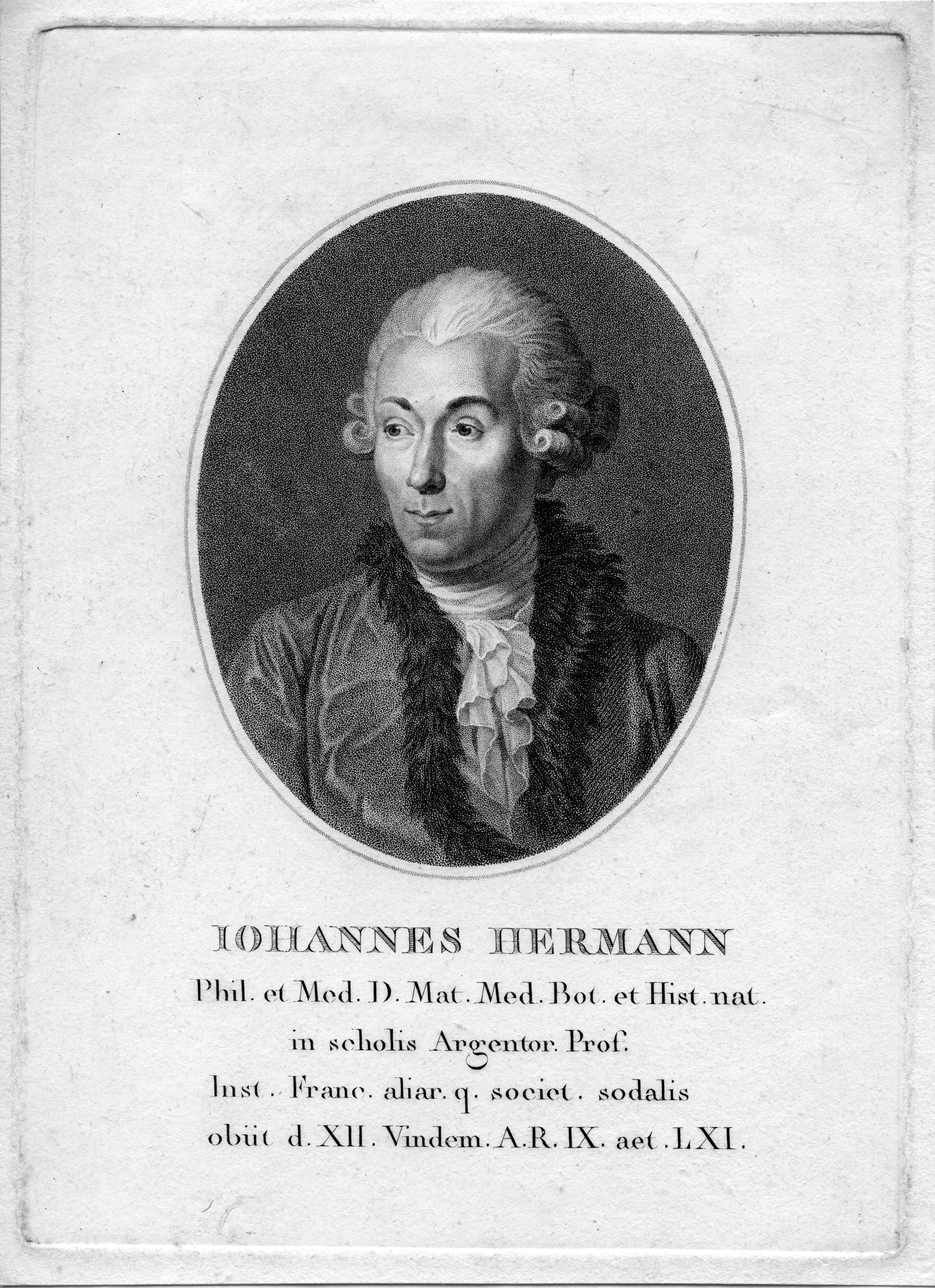 portrait gravé